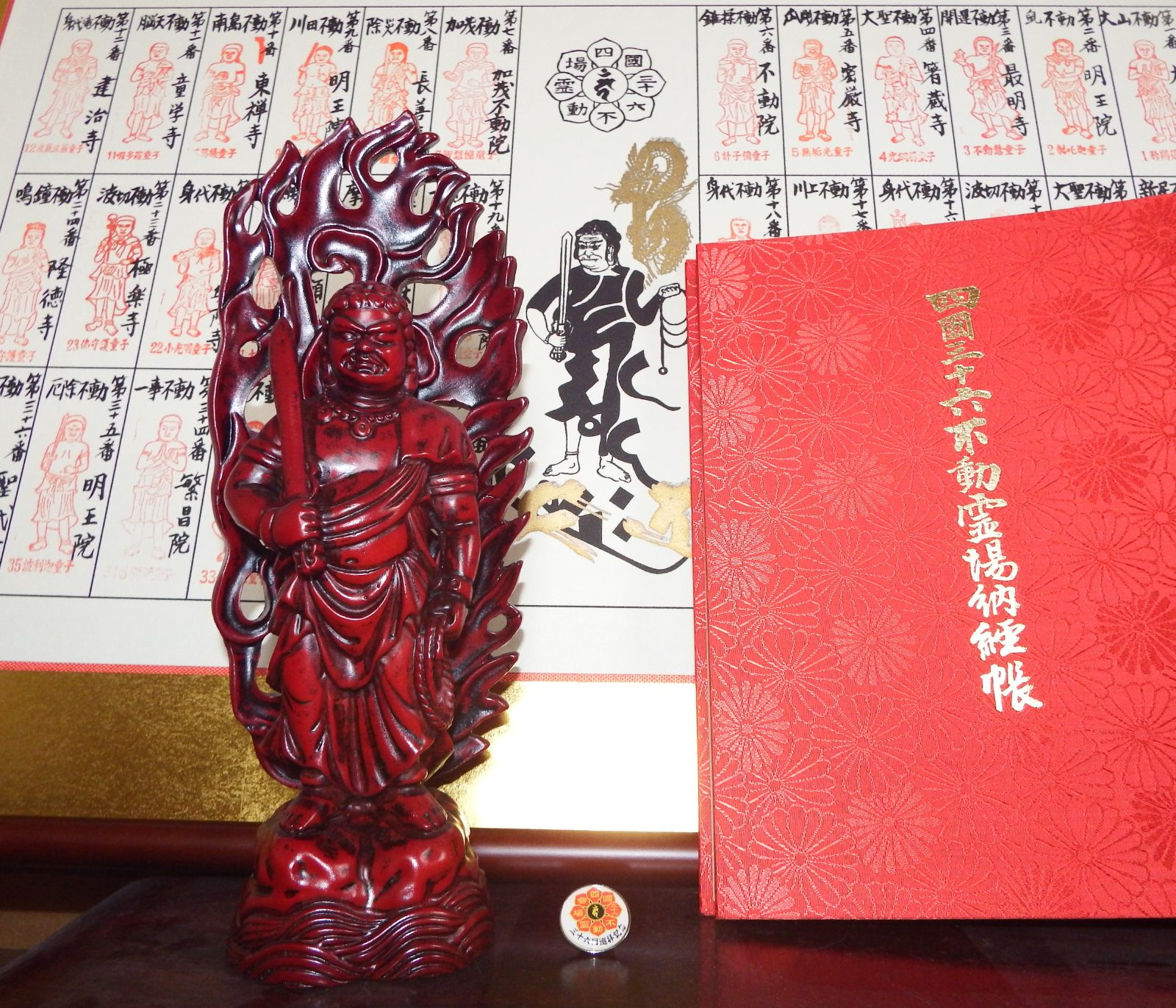 四国三十六不動霊場の贈与品